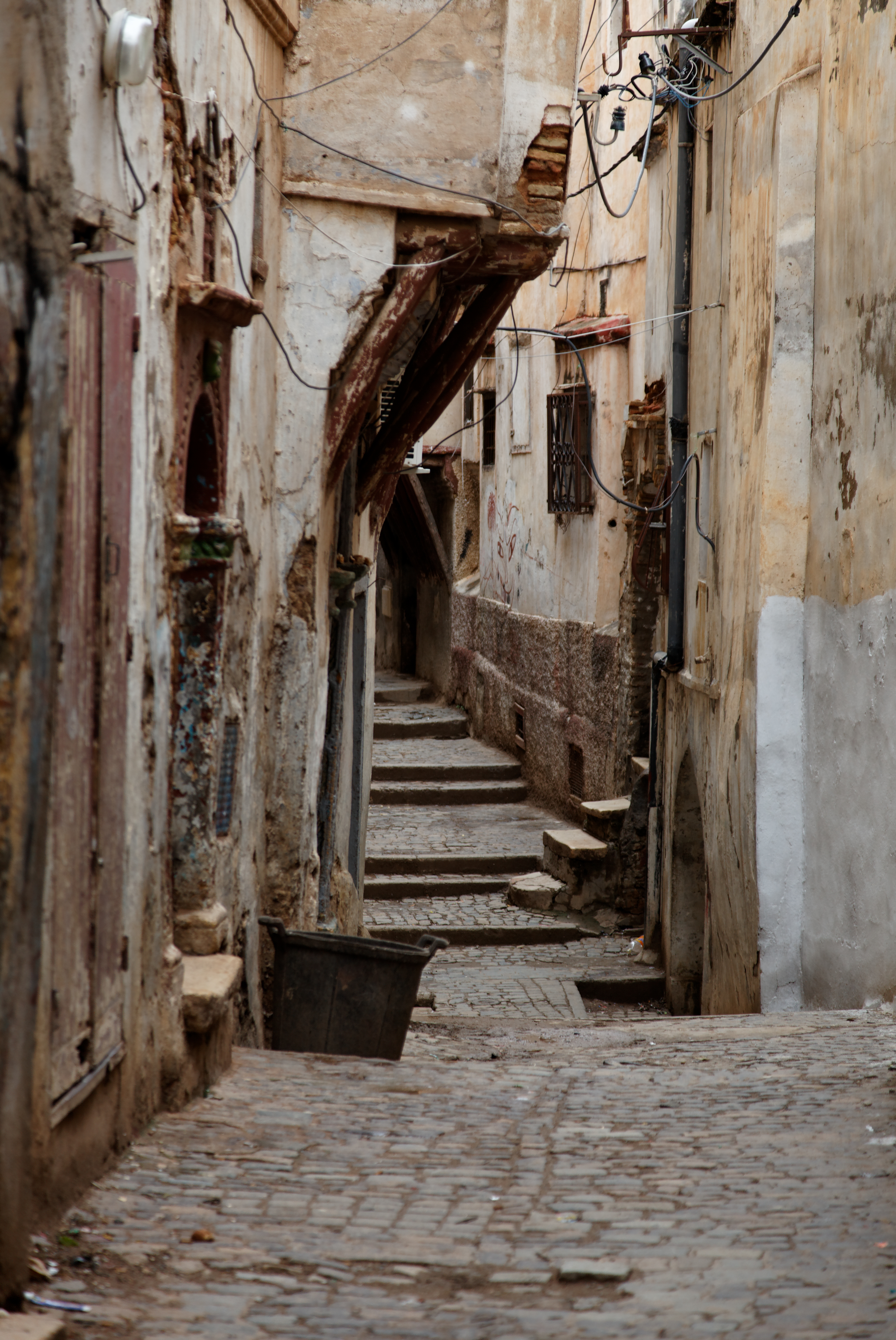 Bab El Oued - Avril 2009.